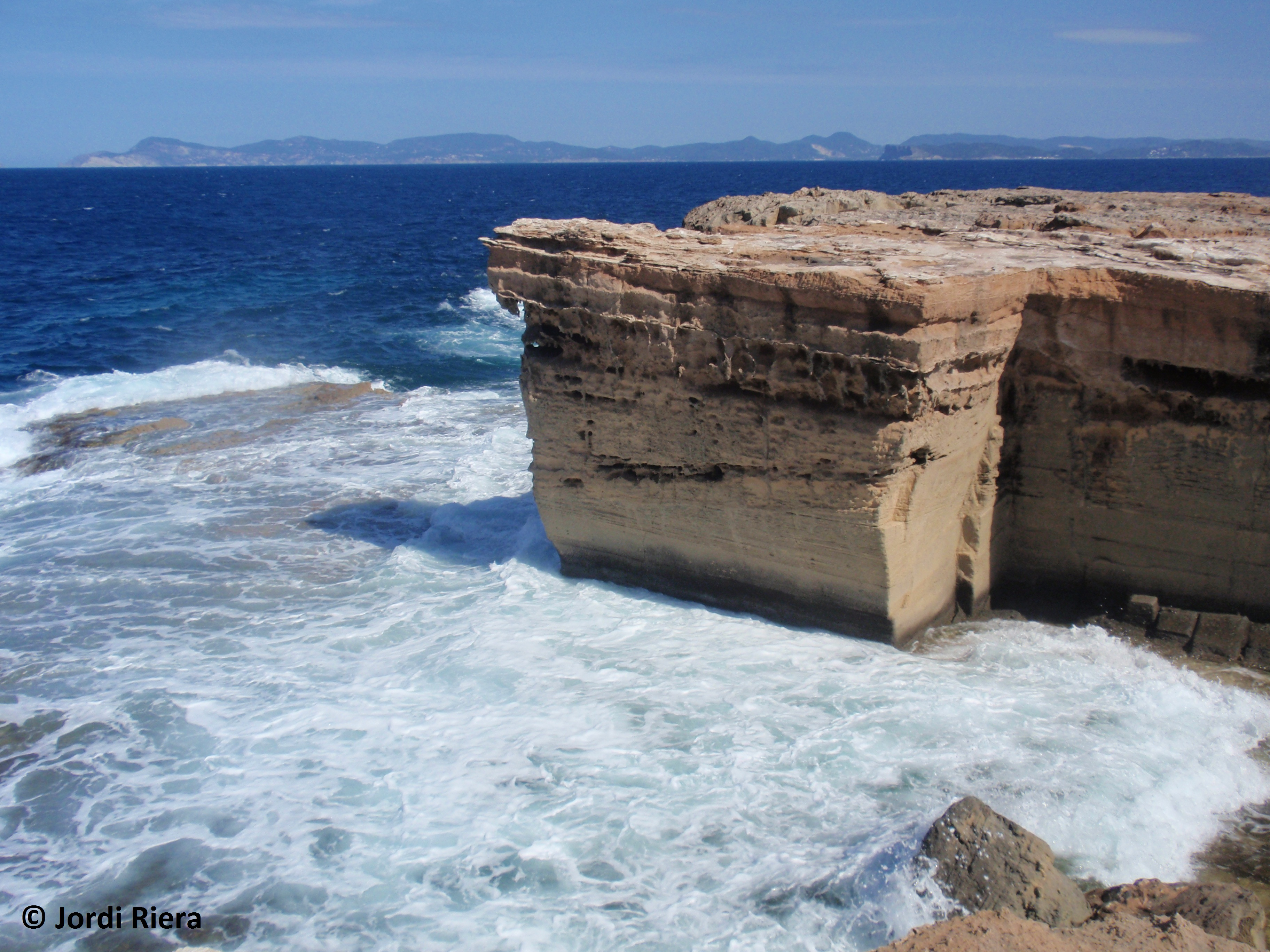 Banda de ponent-mestral de Portossalè, sa Punta de sa Pedrera.